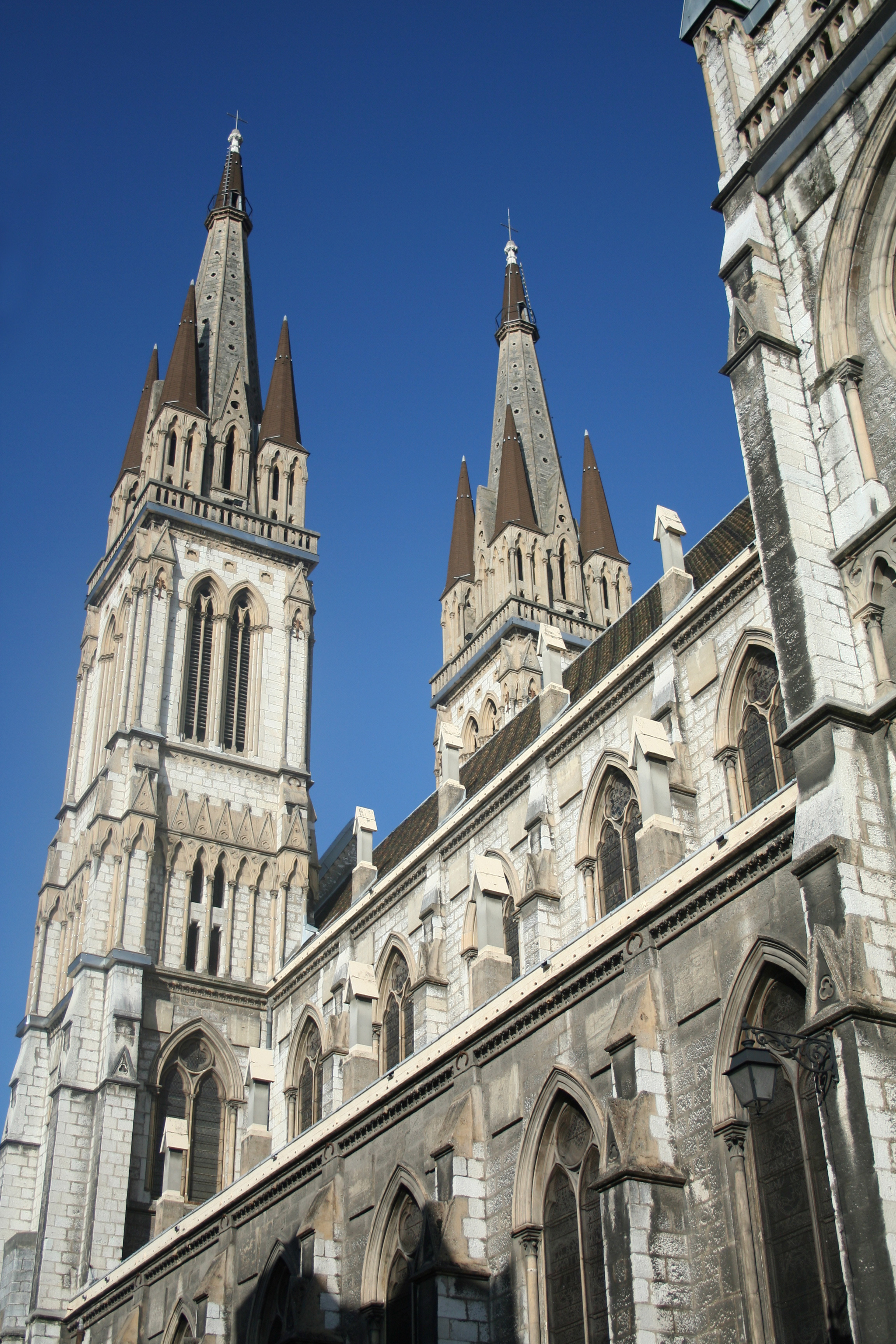 Voiron (Isère, France) - Cathédrale Saint-Bruno.